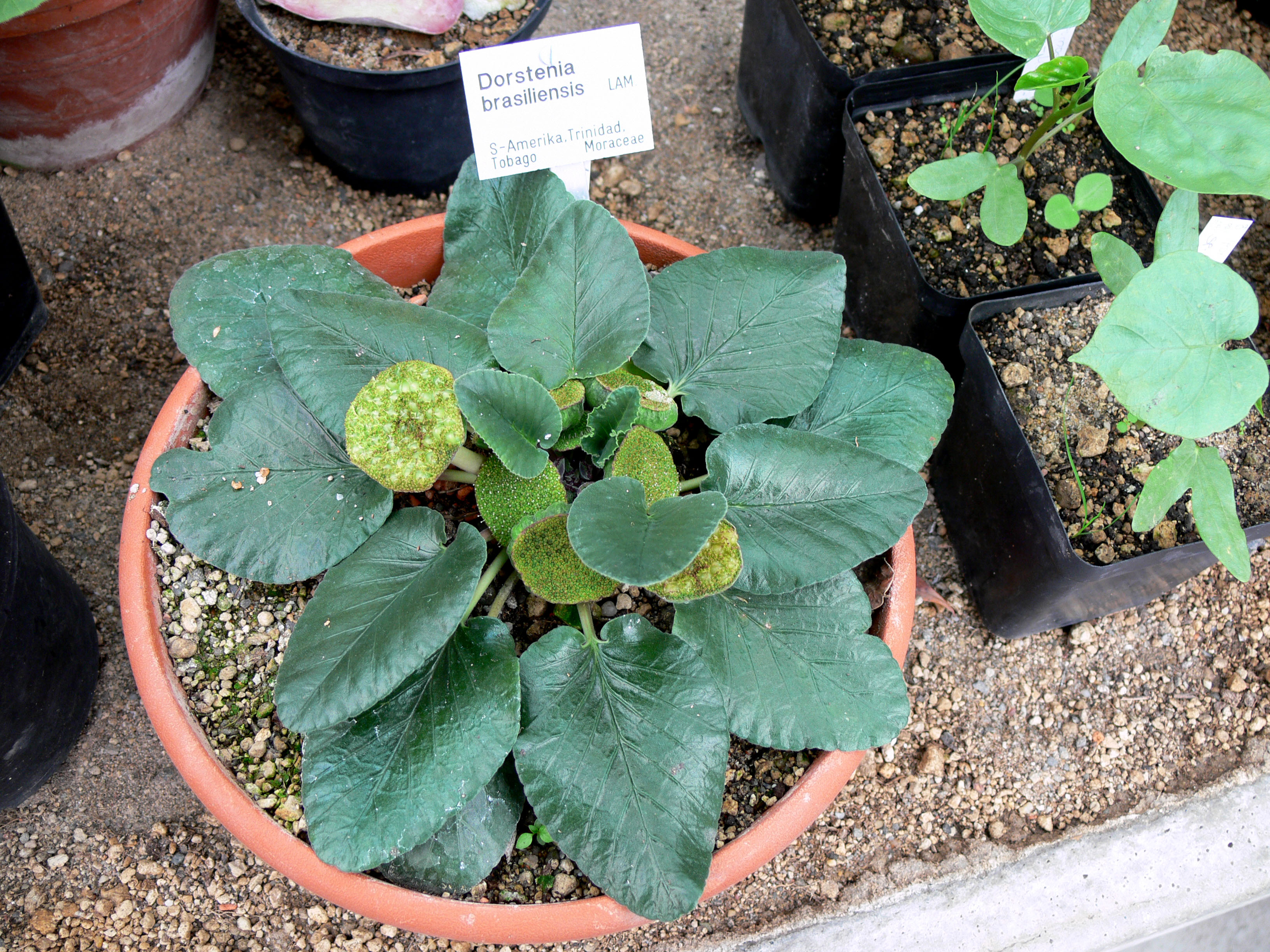 Dorstenia brasiliensis Lam. Familie Moraceae, Südamerika, Trinidad, Tobago. Aufnahme aus dem botanischen Garten der Ruhruniversität Bochum